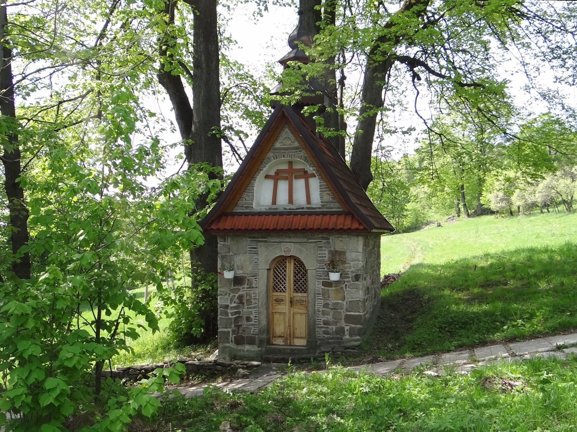 Kapliczka w Tokarni na osiedlu Jaworzyny pod Jaworzyńskim Wierchem